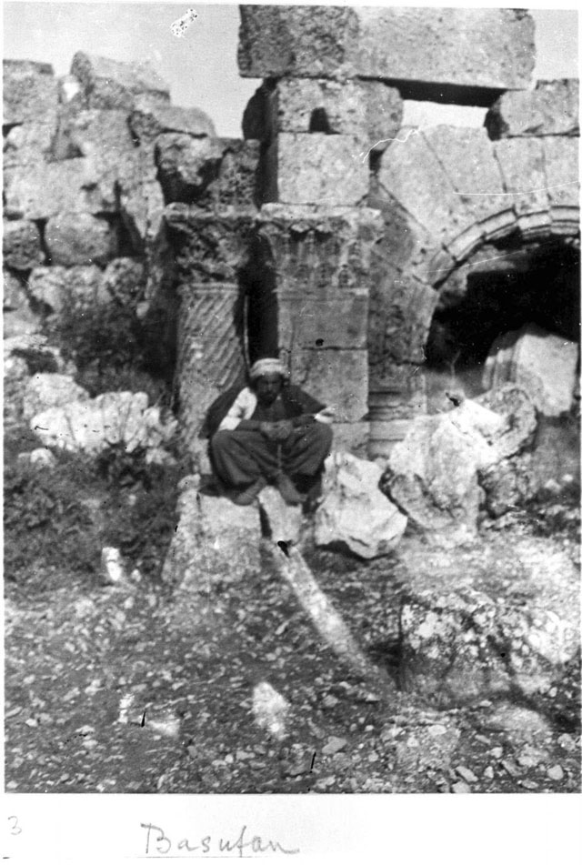 Basufan Church of St. Phocas - Apse and arch of Prothesis - Corinthian columns with spiral fluting and wind blown capital. Kurdish man seated in foreground